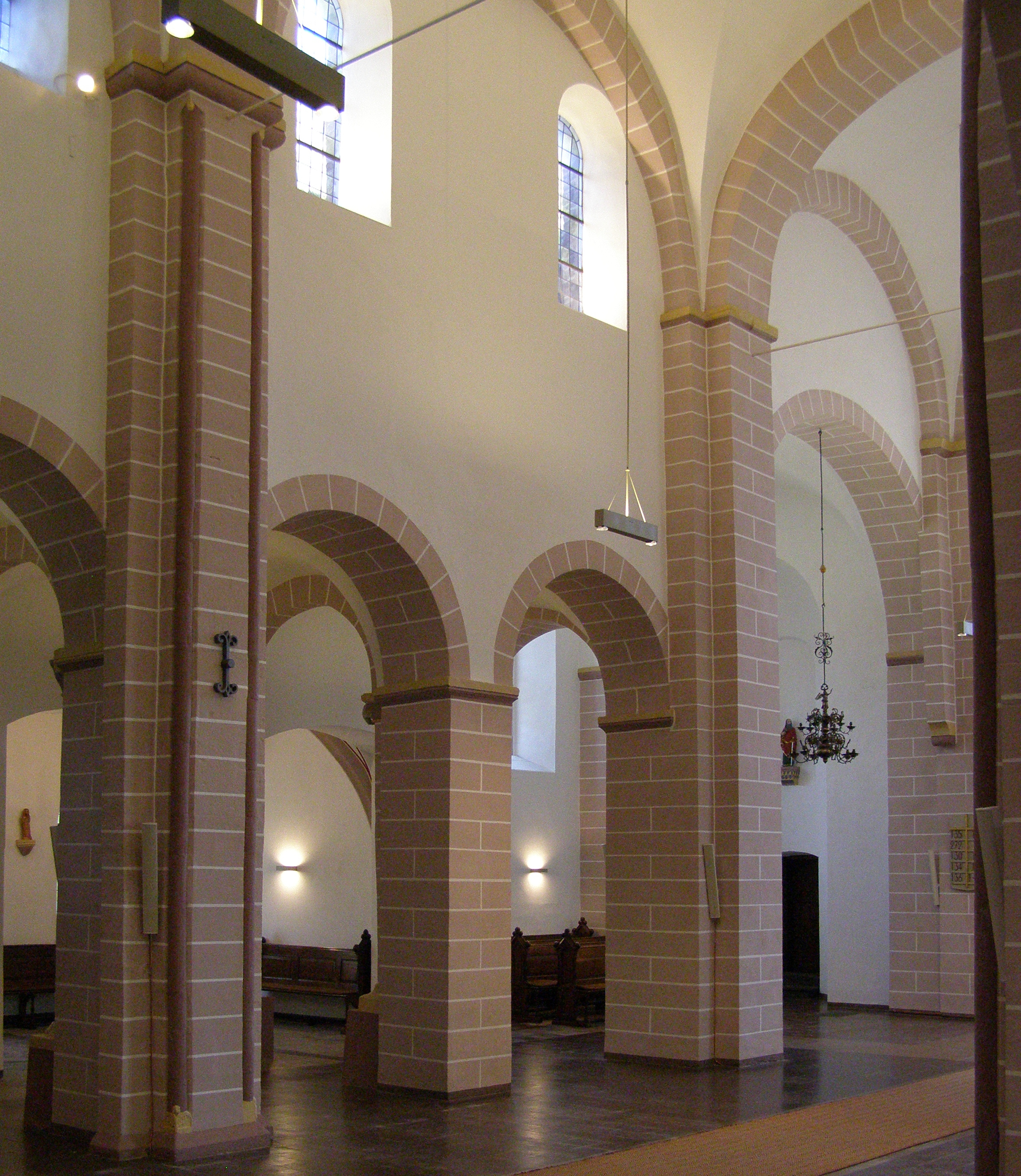 Säulenarchitektur Kilianikirche Höxter